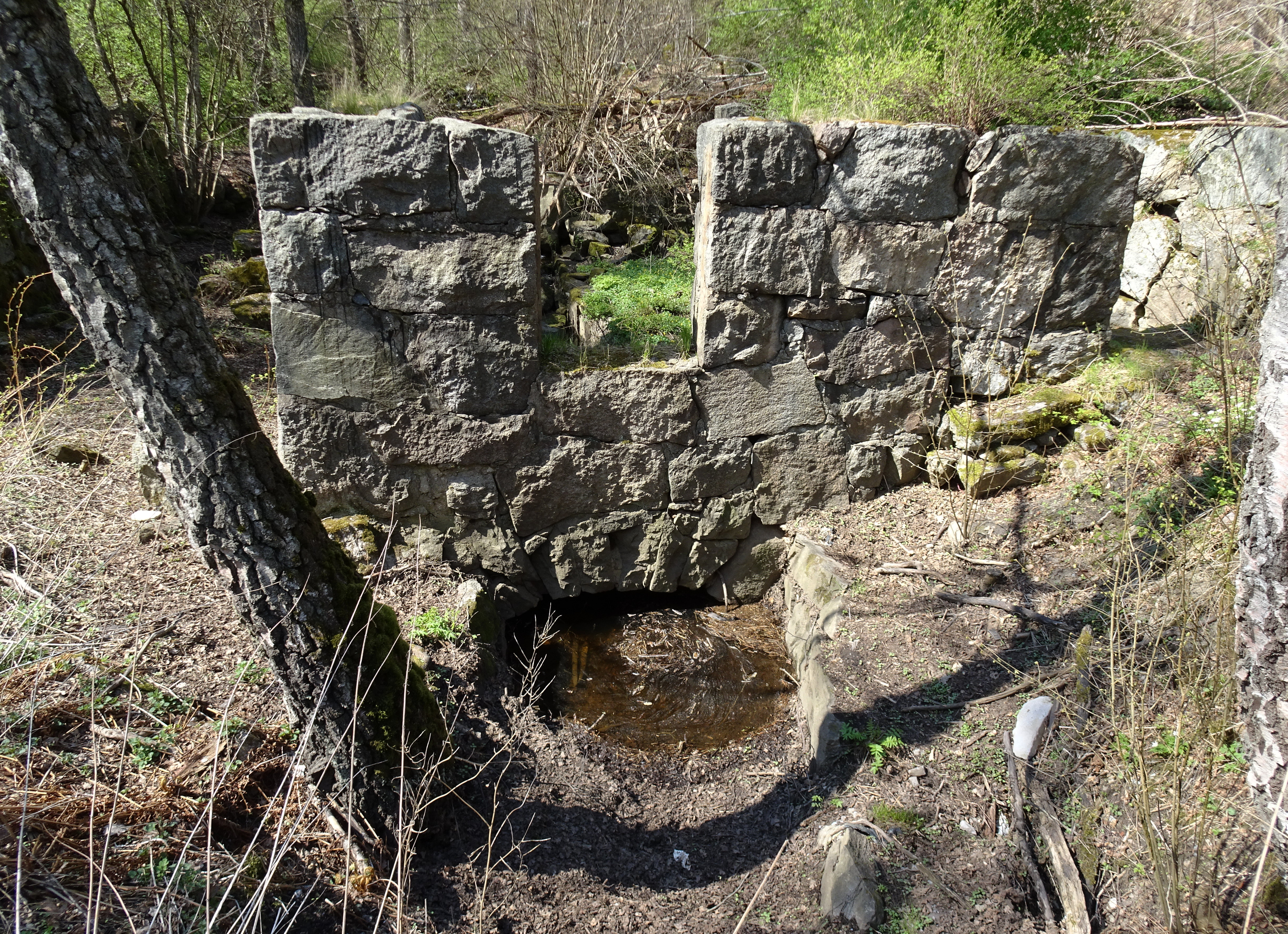 Gladö kvarns kvarnbyggnad (ruin)